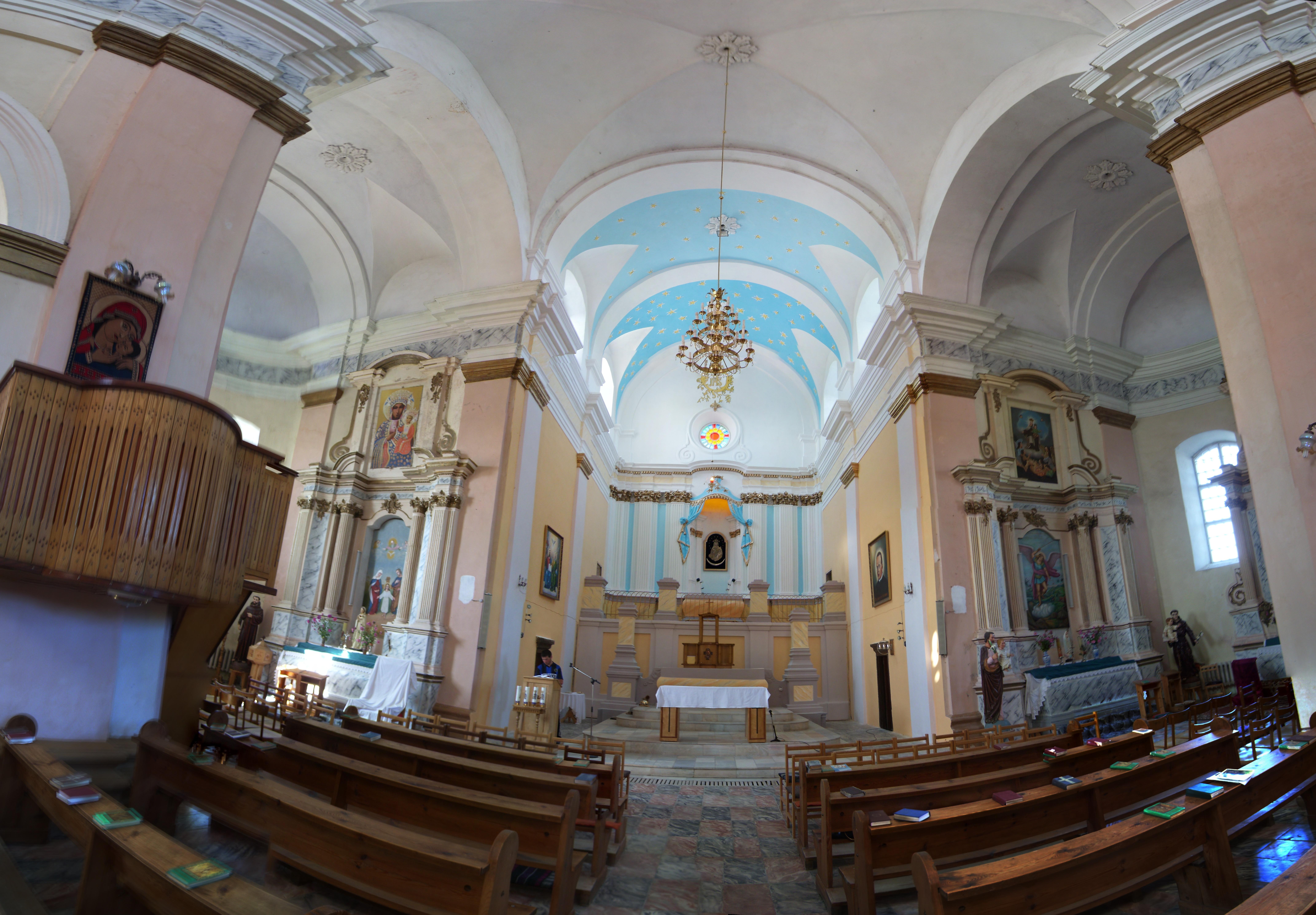 Беларуская (тарашкевіца): Касьцёл Найсьв. Тройцы. в. Дунілавічы